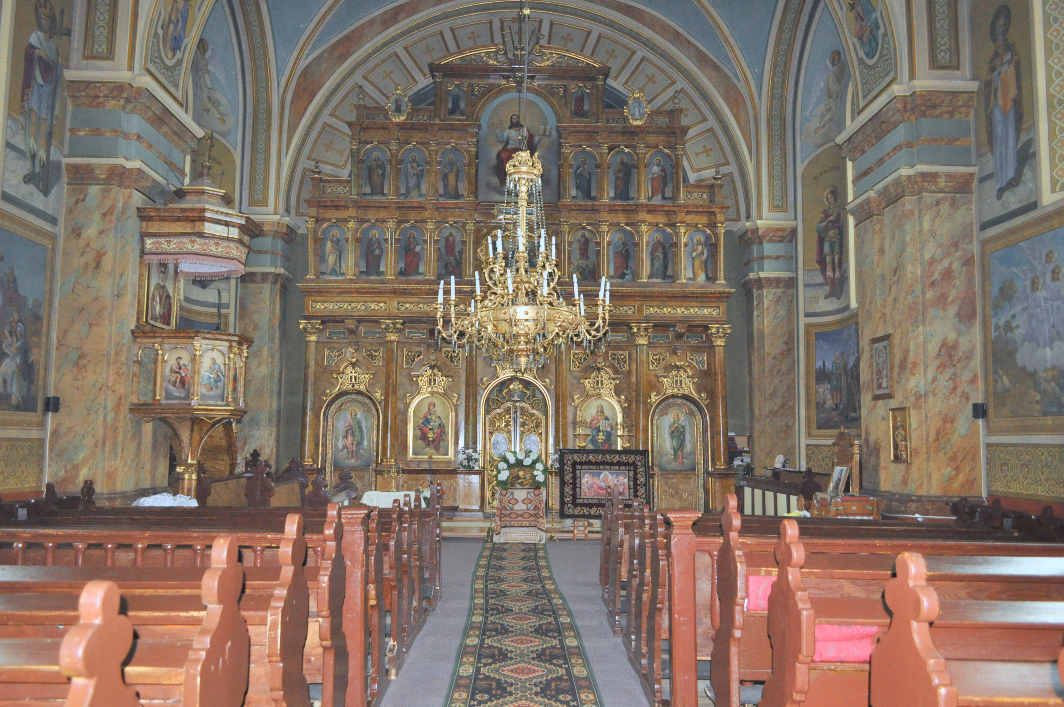 Biserica "Sfântul Nicolae" din Năsăud (deservește parohia ortodoxă Năsăud I, dar este și biserică protopopială)